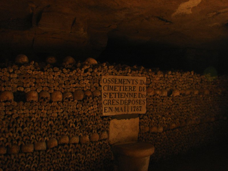 Paris Catacombs Catacumbas de Paris Ossuário Subterrâneo